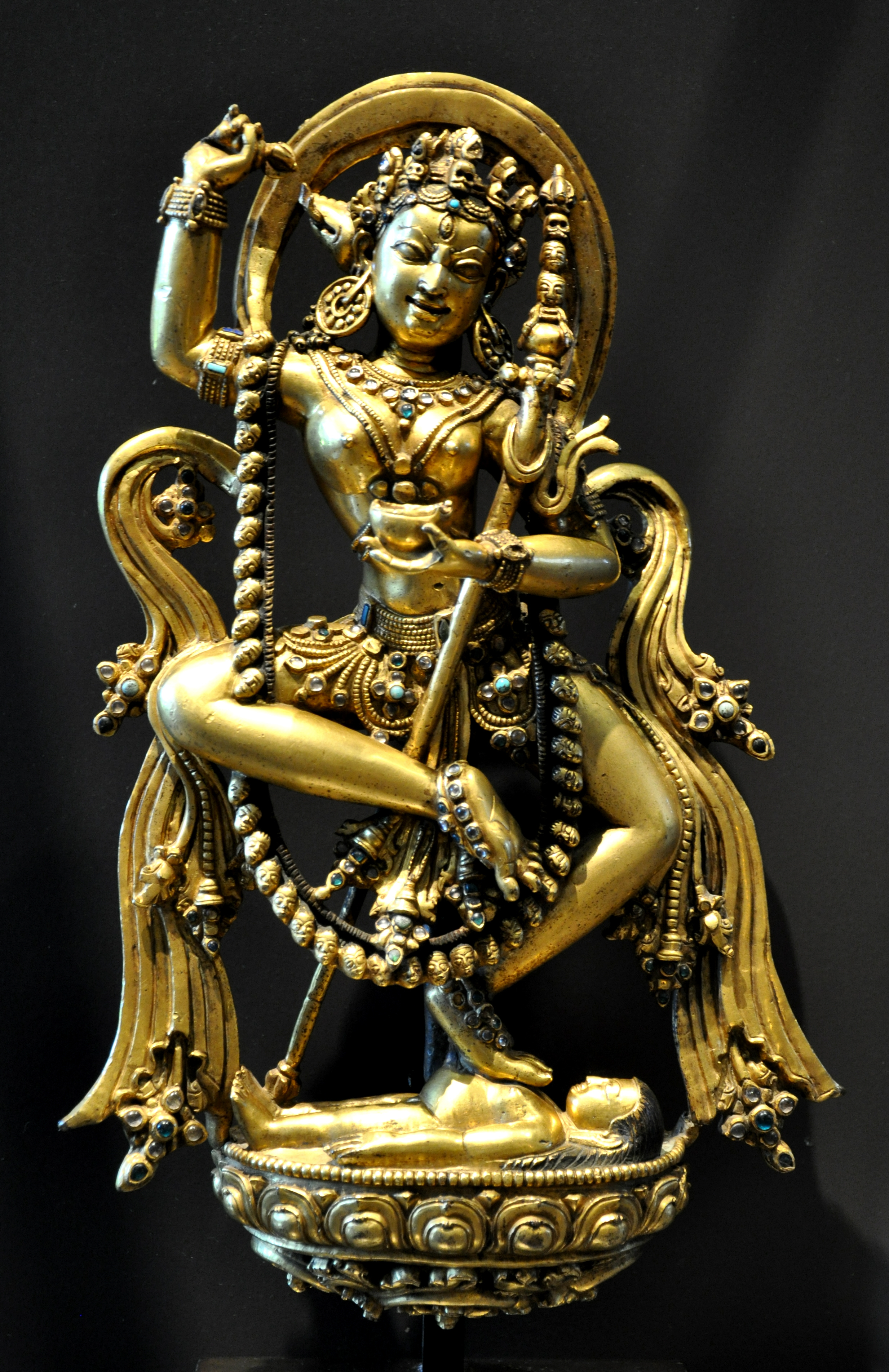 Dakini Vasya-Vajravarahi, Tibet, 15. Jh.; Kupferlegierung, vergoldet; Museum Rietberg, Zürich; Samlung Berti Aschmann, Inv. Nr. BA 109